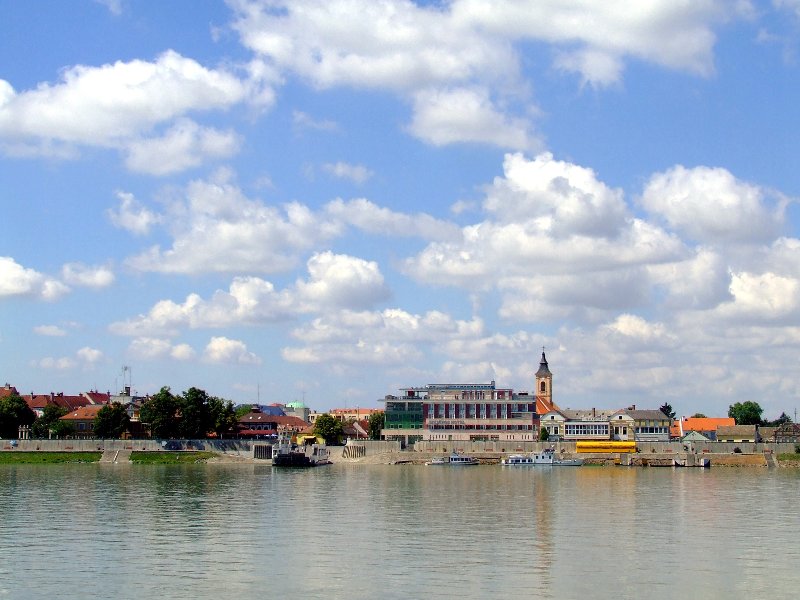 Mohács látképe az újmohácsi kompkikötő felől